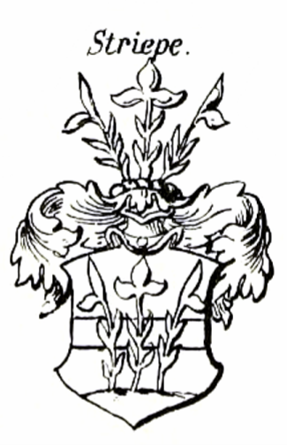 Wappen derer Striepe, eines altmärkischen Geschlechts.